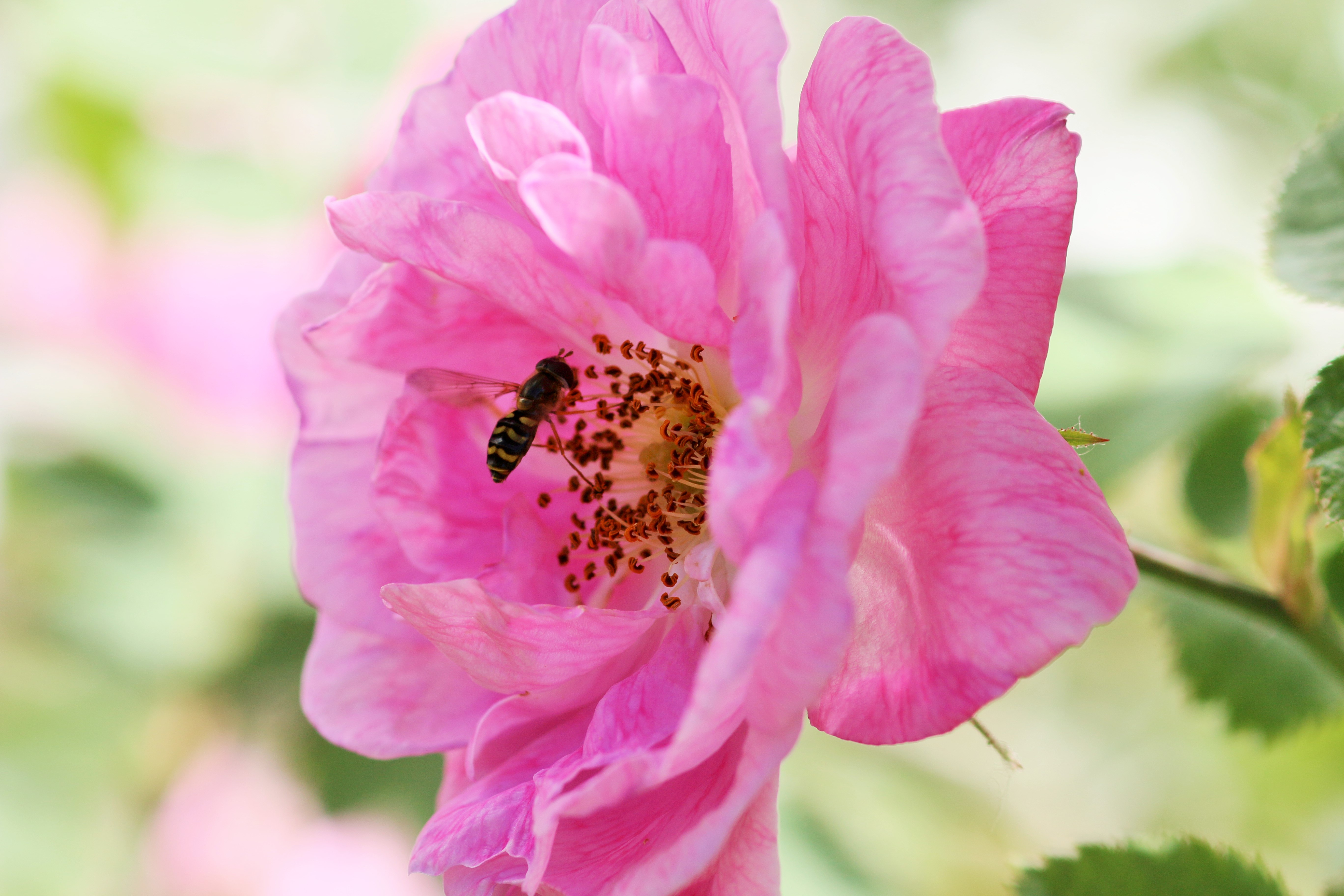 Hurdalsrose i sørveggen på småbruket Gryteengen på Toten.